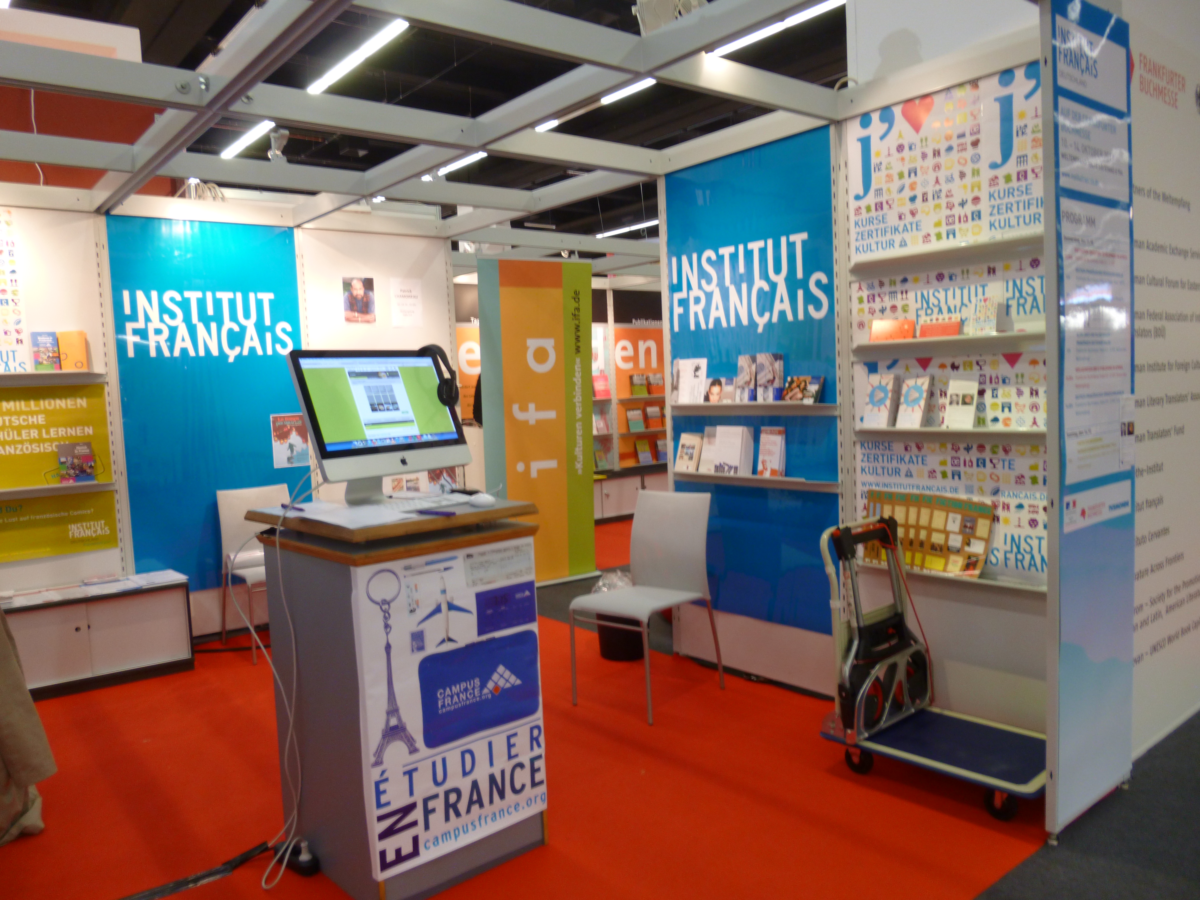 stando de la institucio Institut Français pri instruo de la franca lingvo en la Frankfurta librofoiro 2012